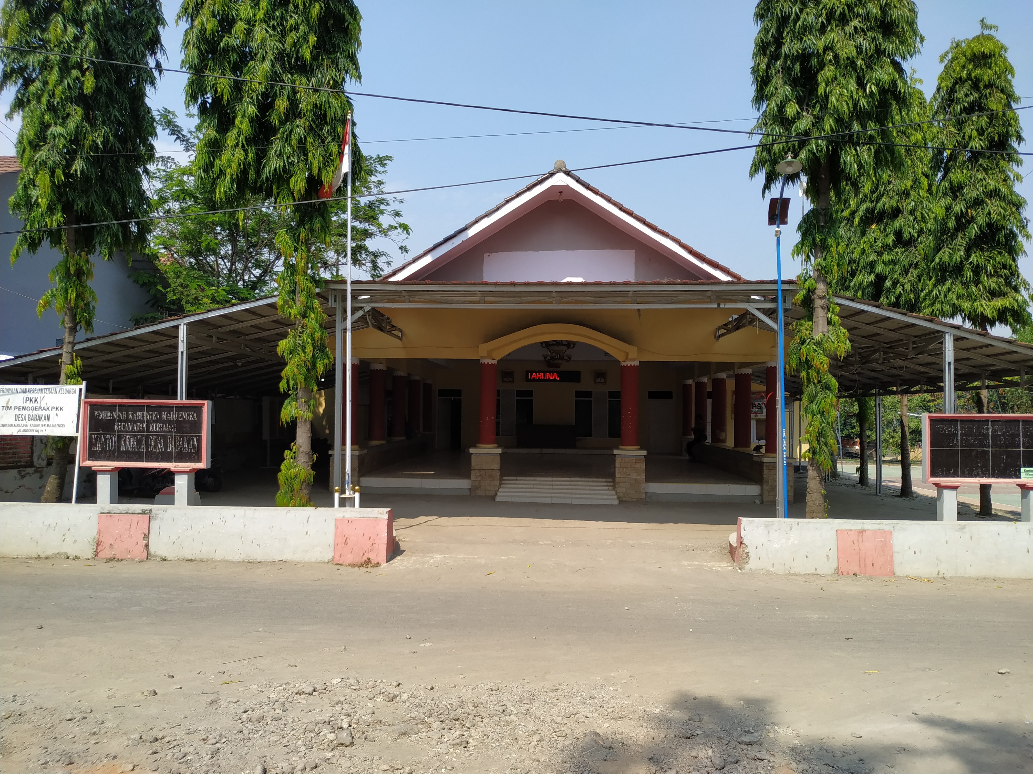 Kantor Desa Babakan